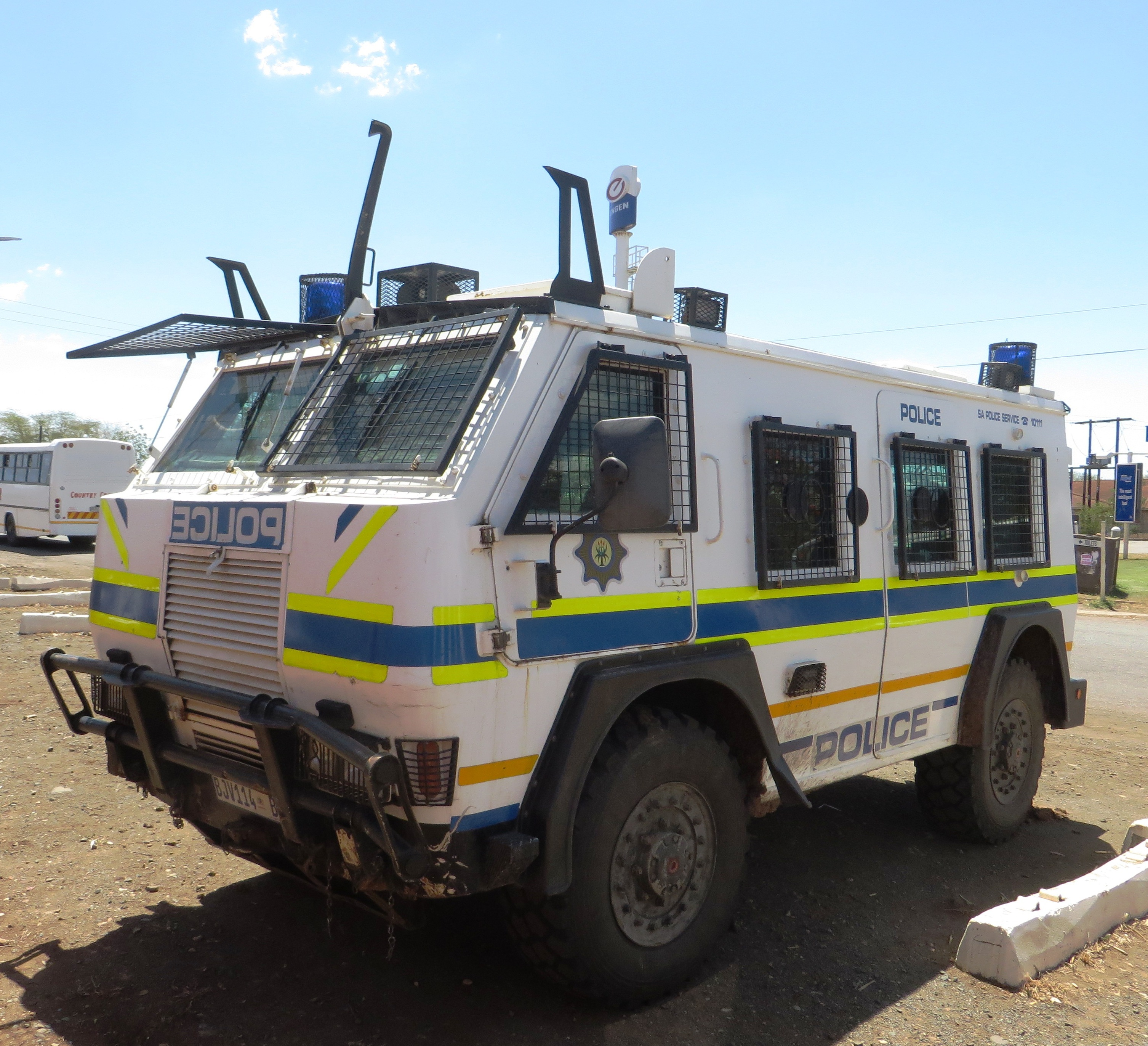 Zuid Afrikaanse politieauto